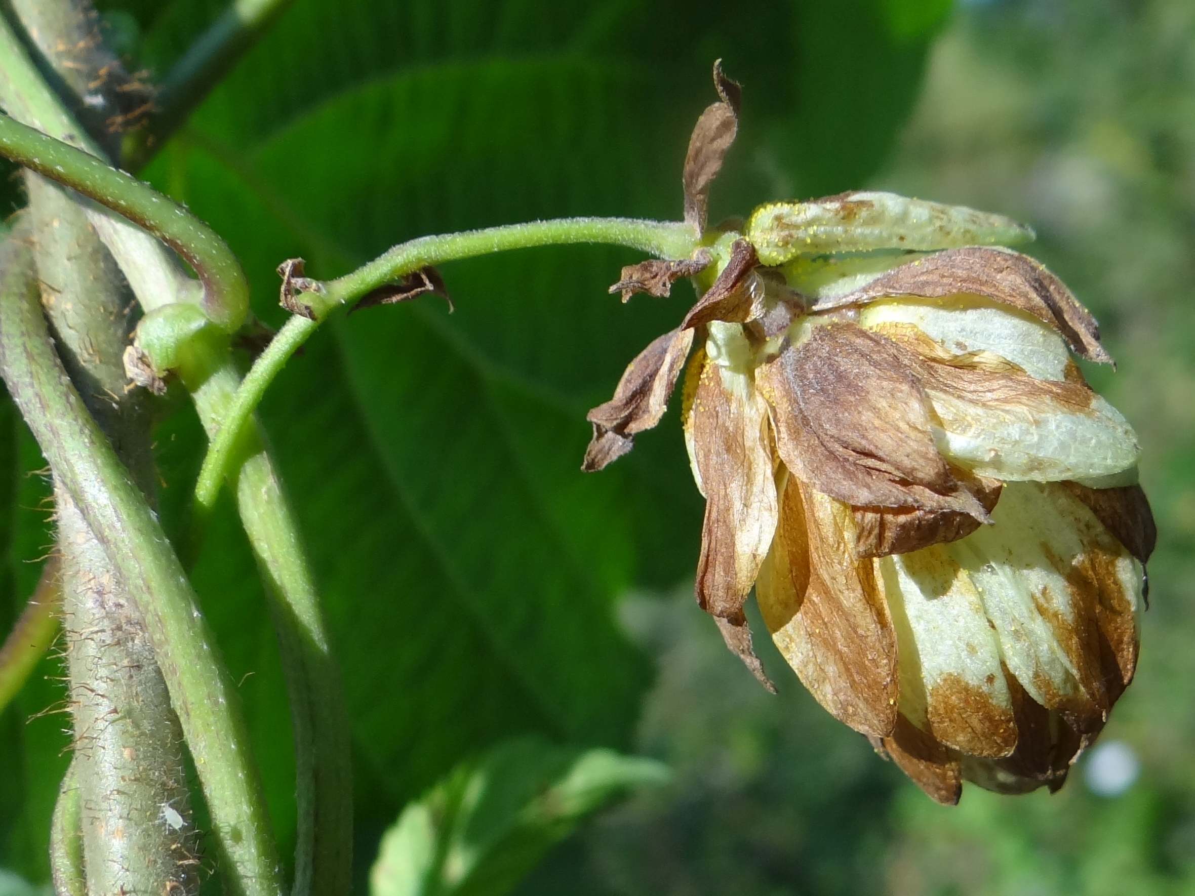 Pseudoperonospora cubensis on Humulus lupulus. Location: Poland, Gdów